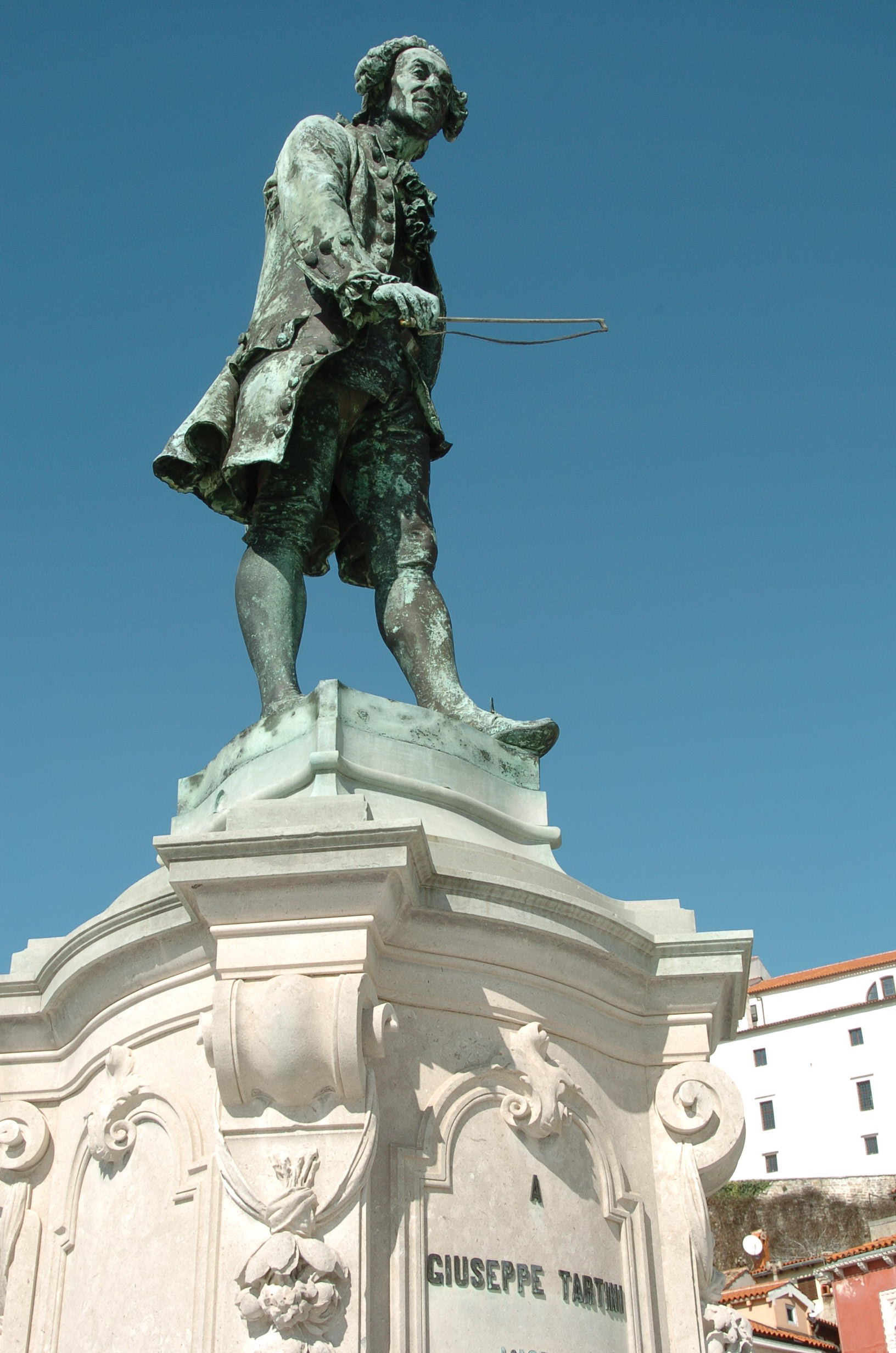 Monument of violinist Giuseppe Tartini in Piran, Slovenija